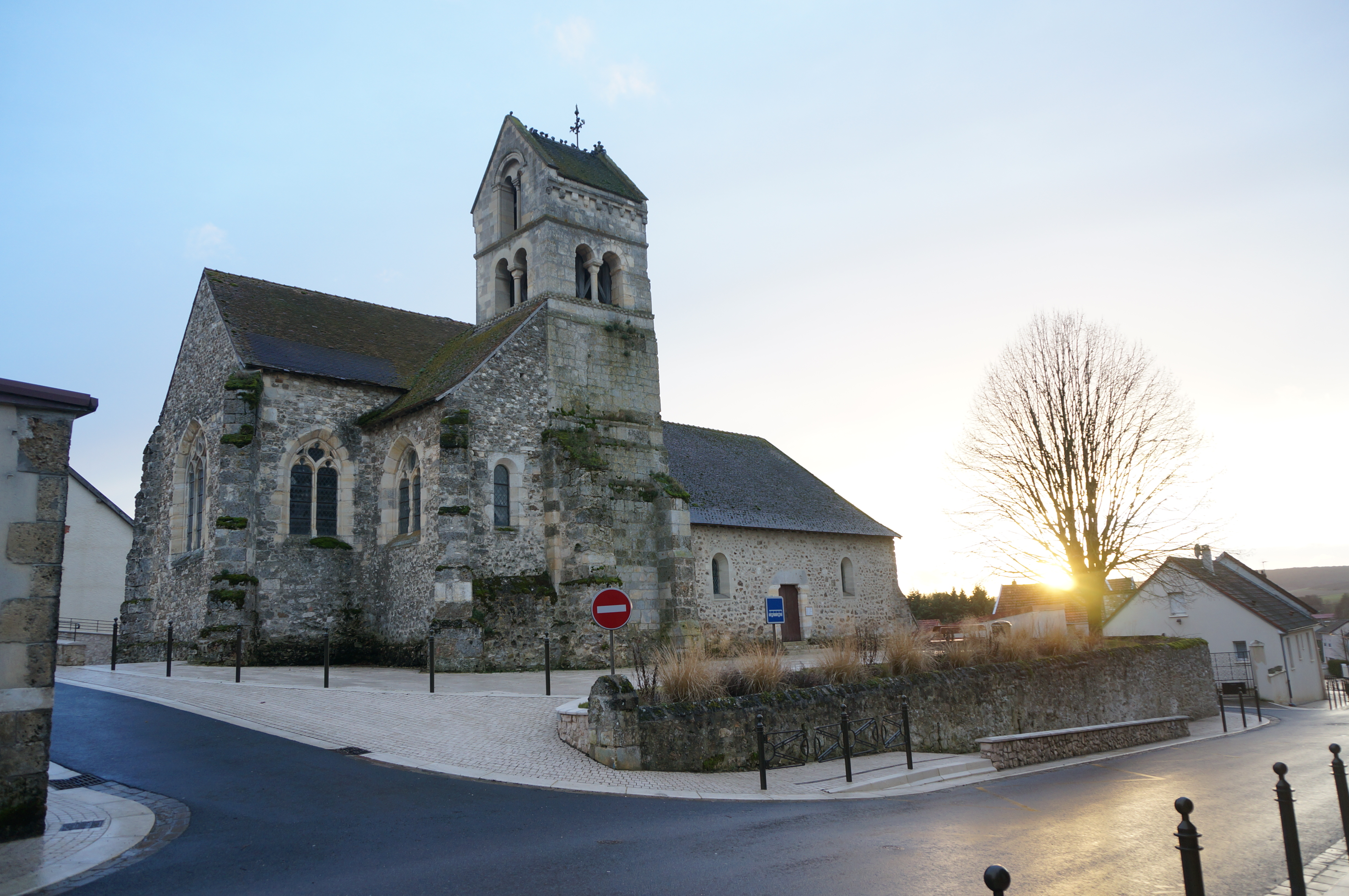 vue de l'Église Cuchery.